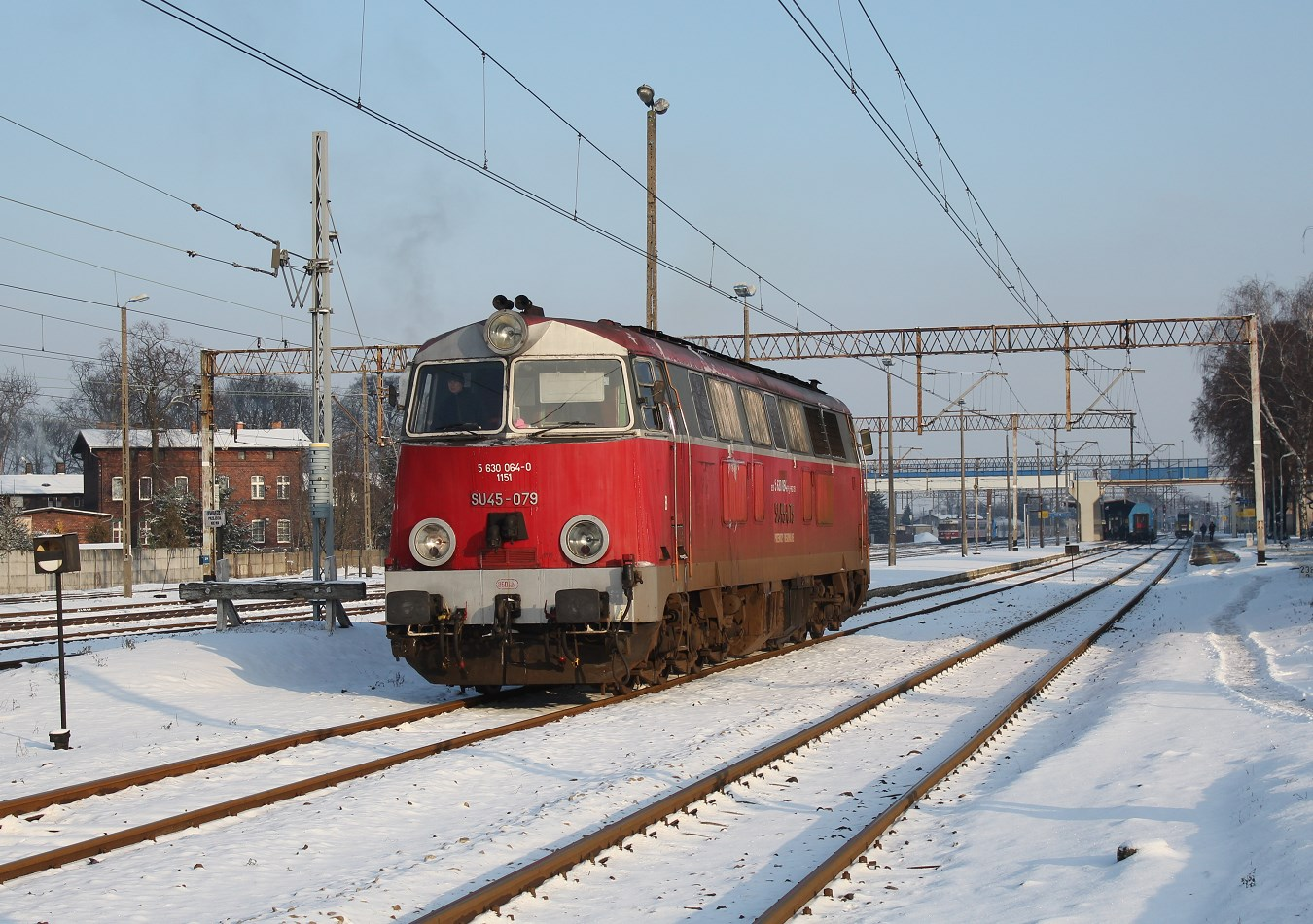 Letzte aktive SU45 in Polen.